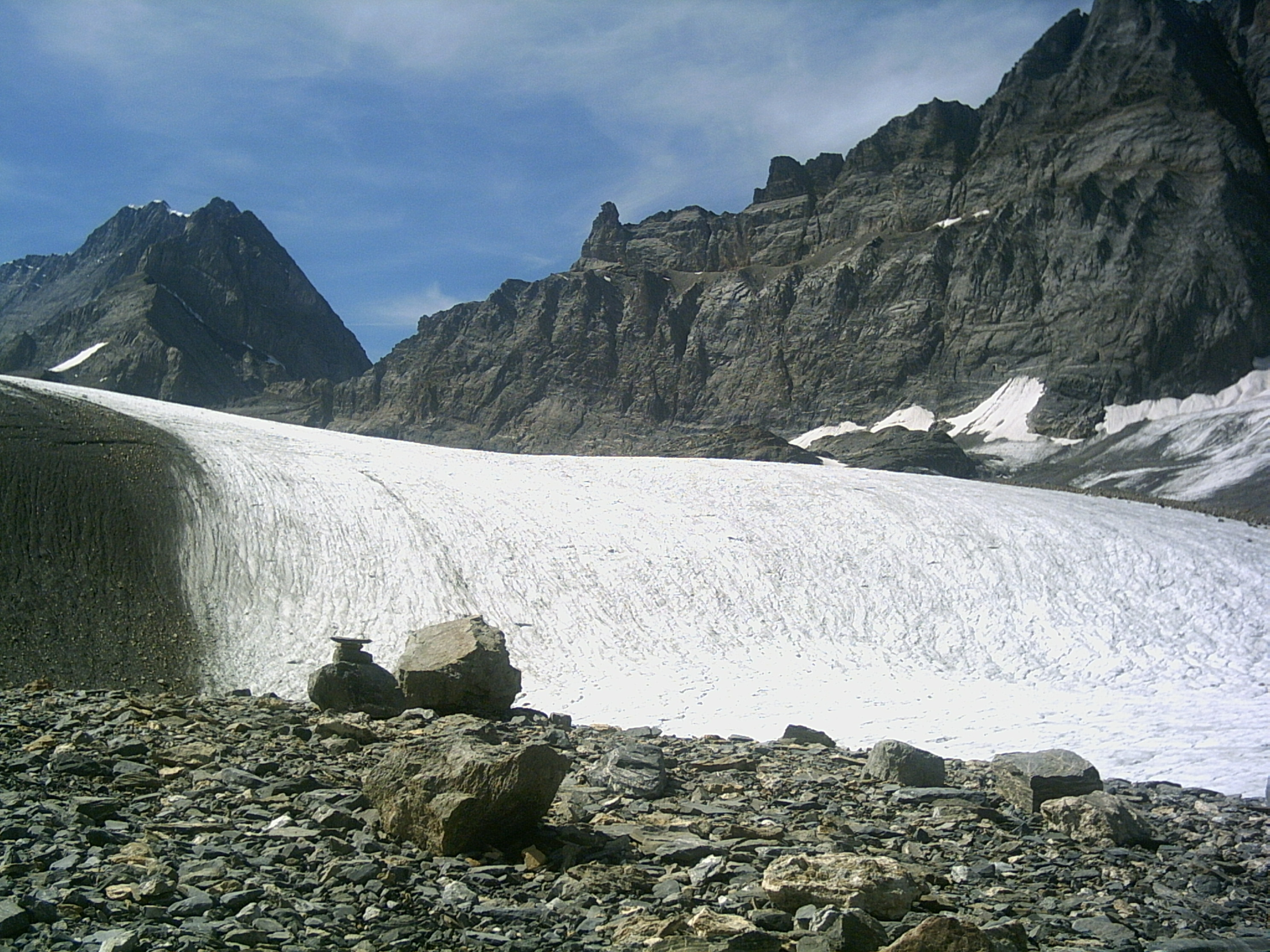 Tschingelfirn Berner Oberland Schweiz